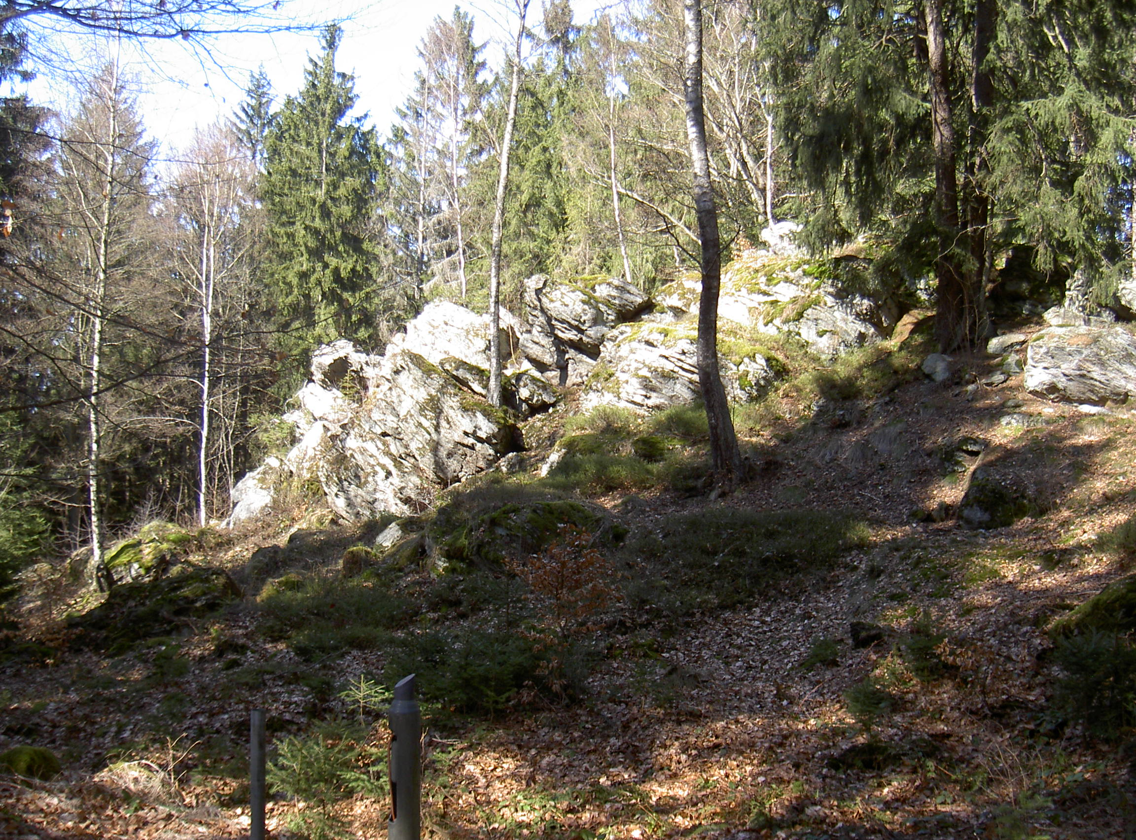 Geotop Steinfelsen (Schönsee)